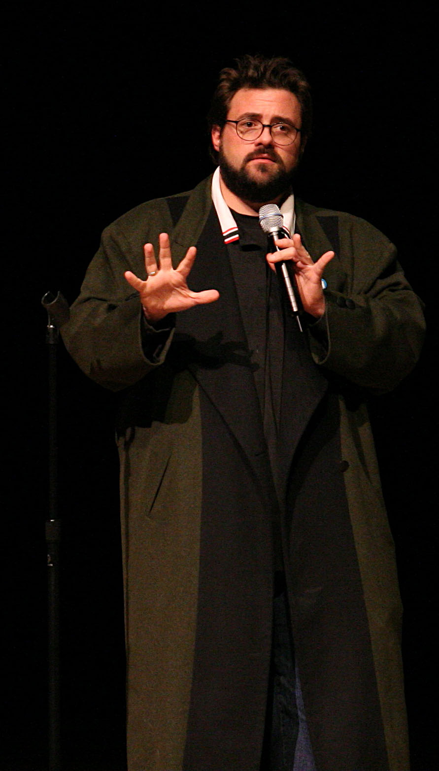 image from enwiki autor en User